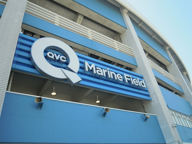 千葉県千葉市・QVCマリンフィールド。2011年ネーミングライツにより名称変更